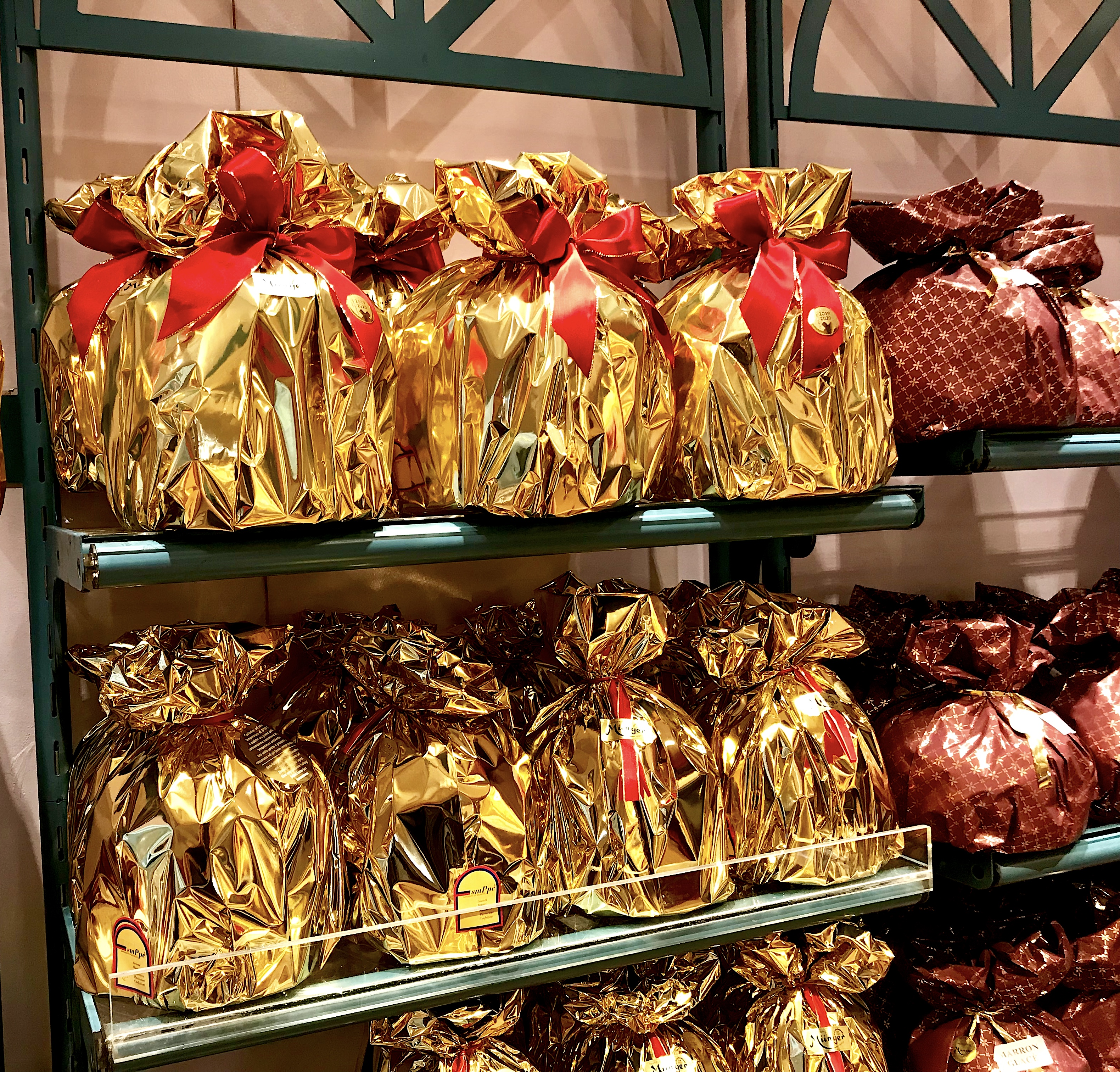 Geschenkverpackung Panettone (Münger 2018)